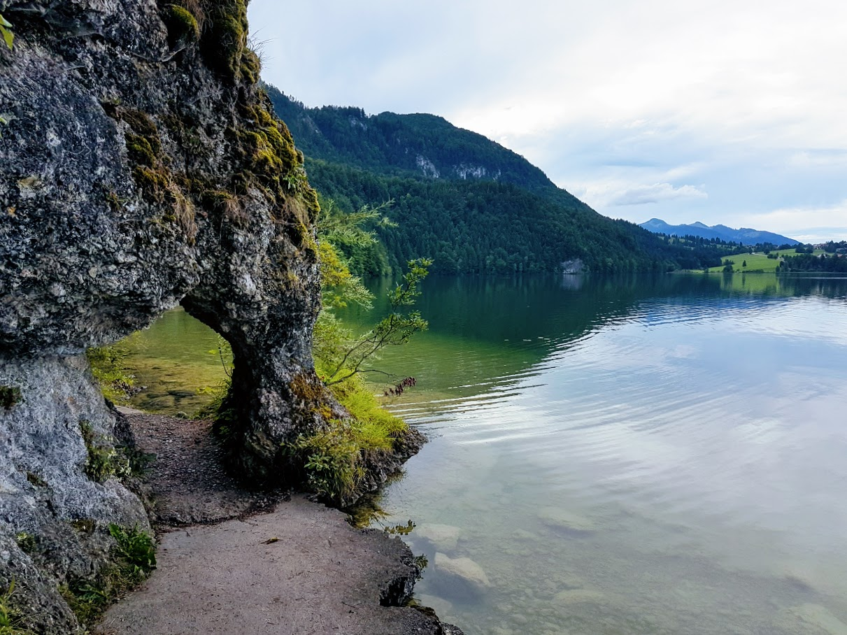 Felsentor am Südufer des Weißensees (2017)